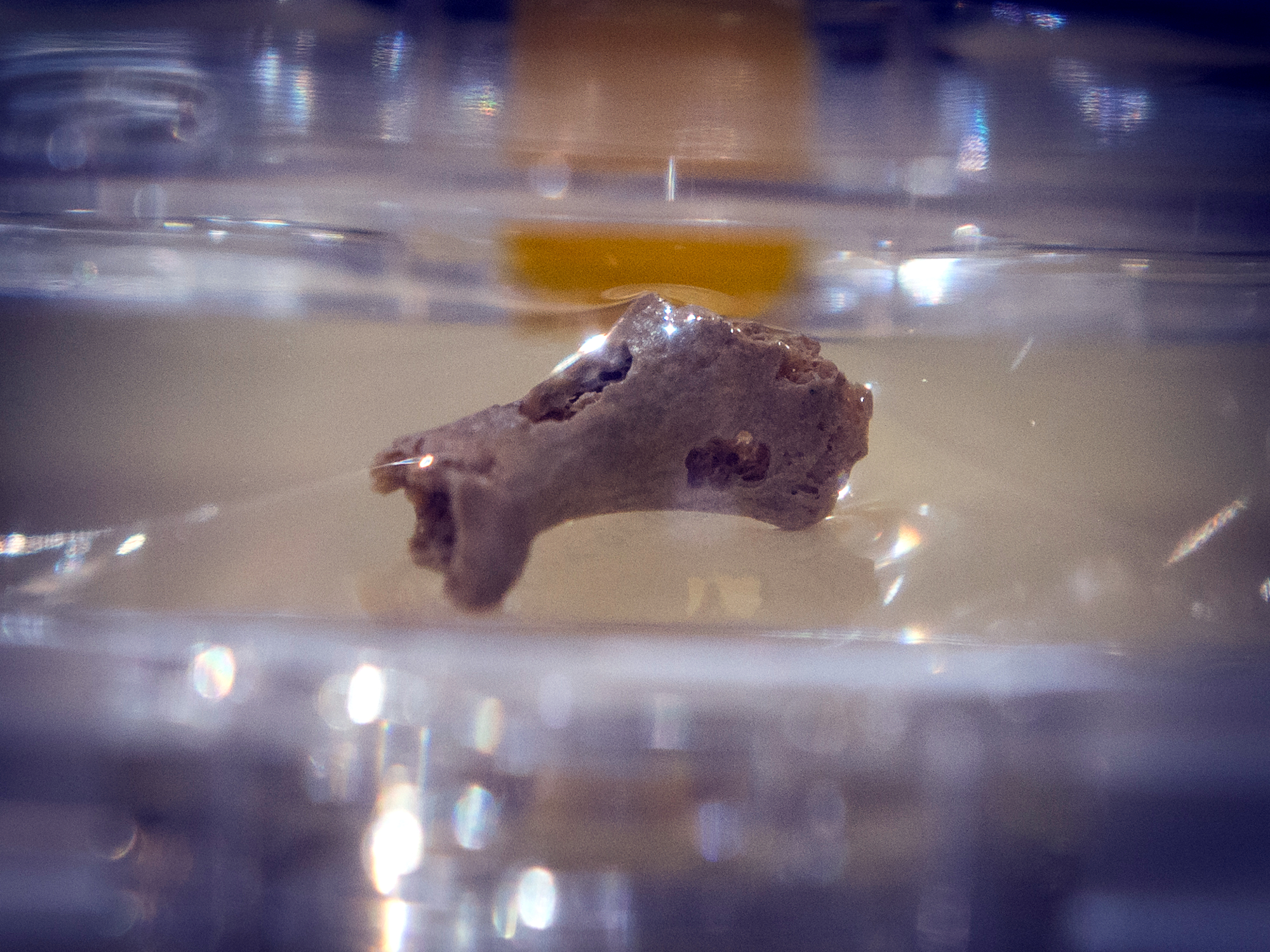 Fossil Denisova 5: In der Denisova-Höhle gefundener Zehenknochen (Grundglied) eines Neandertalers mit Beprobungsspuren. Original, ausgestellt in der Sonderausstellung "Le troisième Homme" im Musée national de Préhistoire in Les Eyzies-de-Tayac, Frankreich.